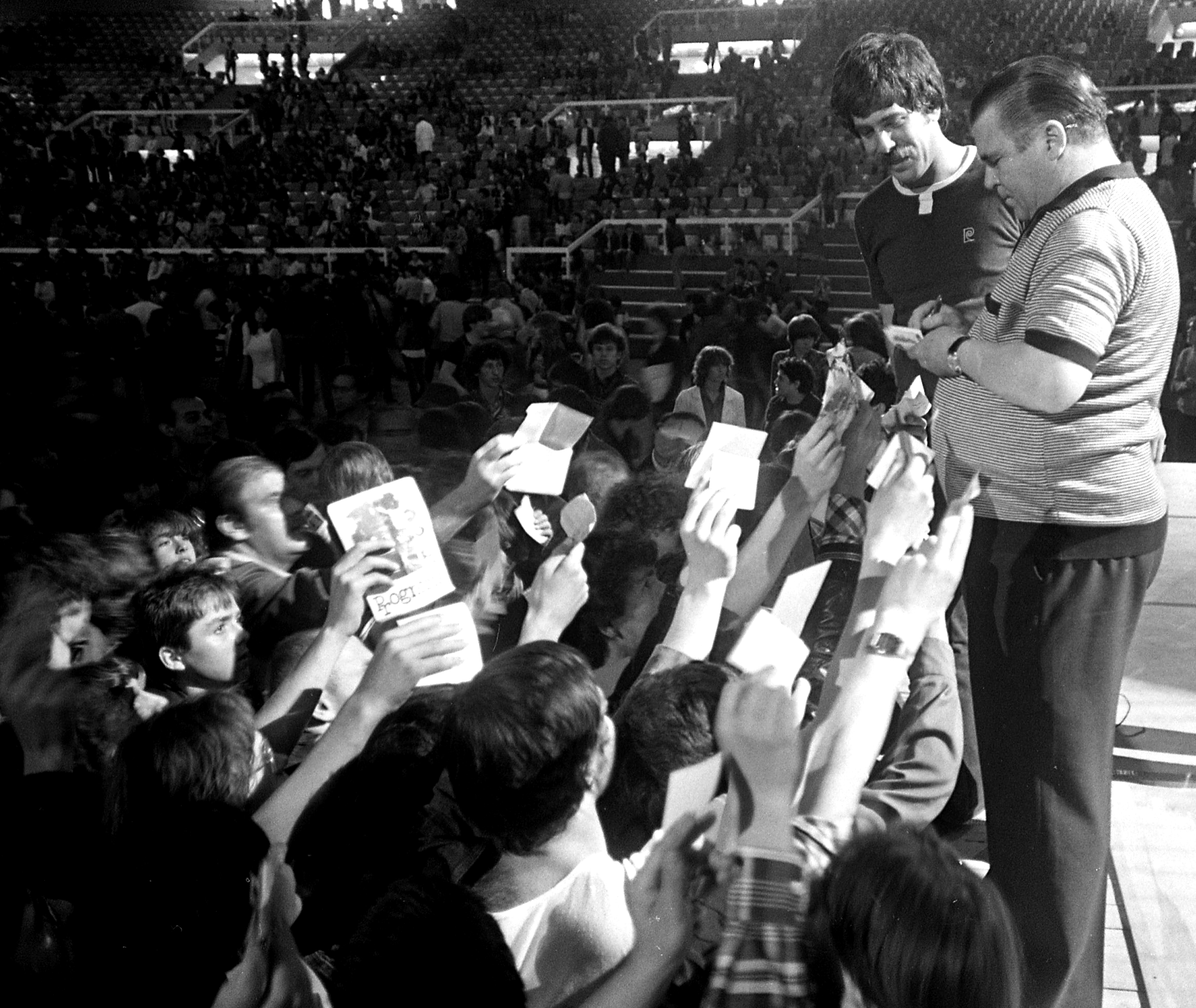 Budapest Sportcsarnok, Puskás Öcsi dedikál, mellette Déri János riporter.